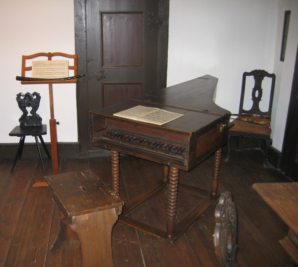 Ein Zimmer im Bachhaus Eisenach